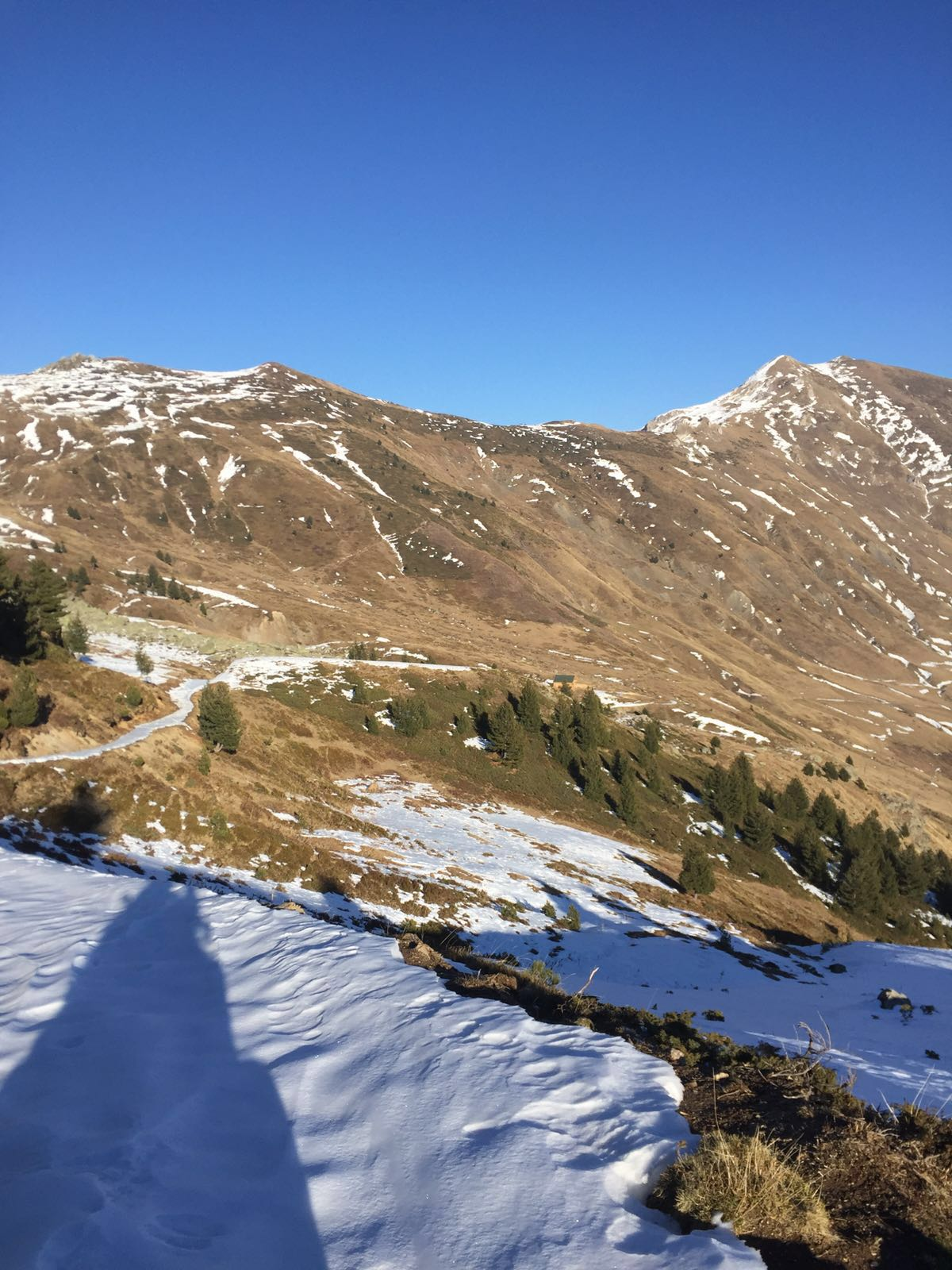 Lugina e Valbones, Tropoje